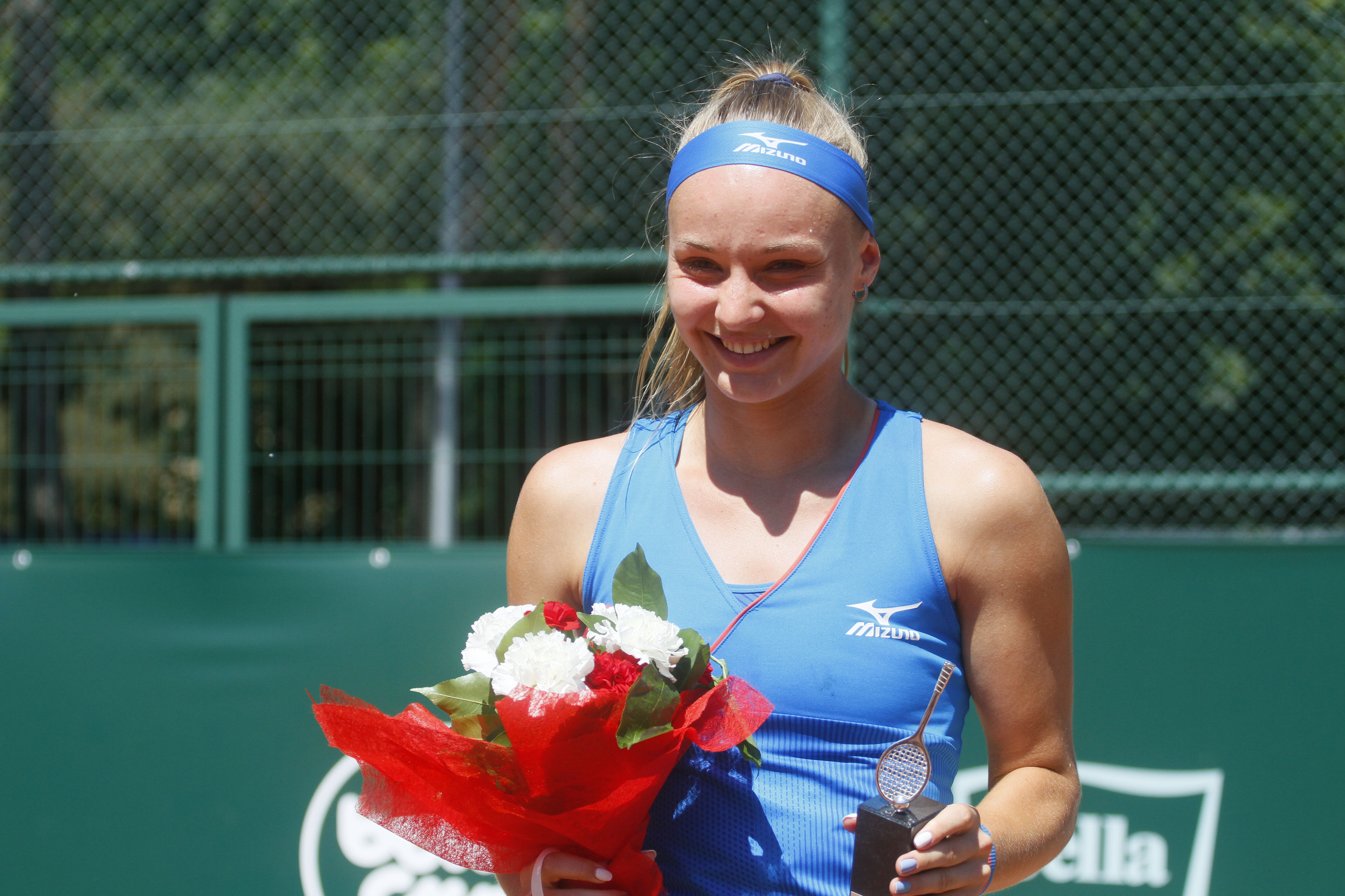 Zwyciężczyni 25. MTTK Bella Cup Rebecca Šramková.